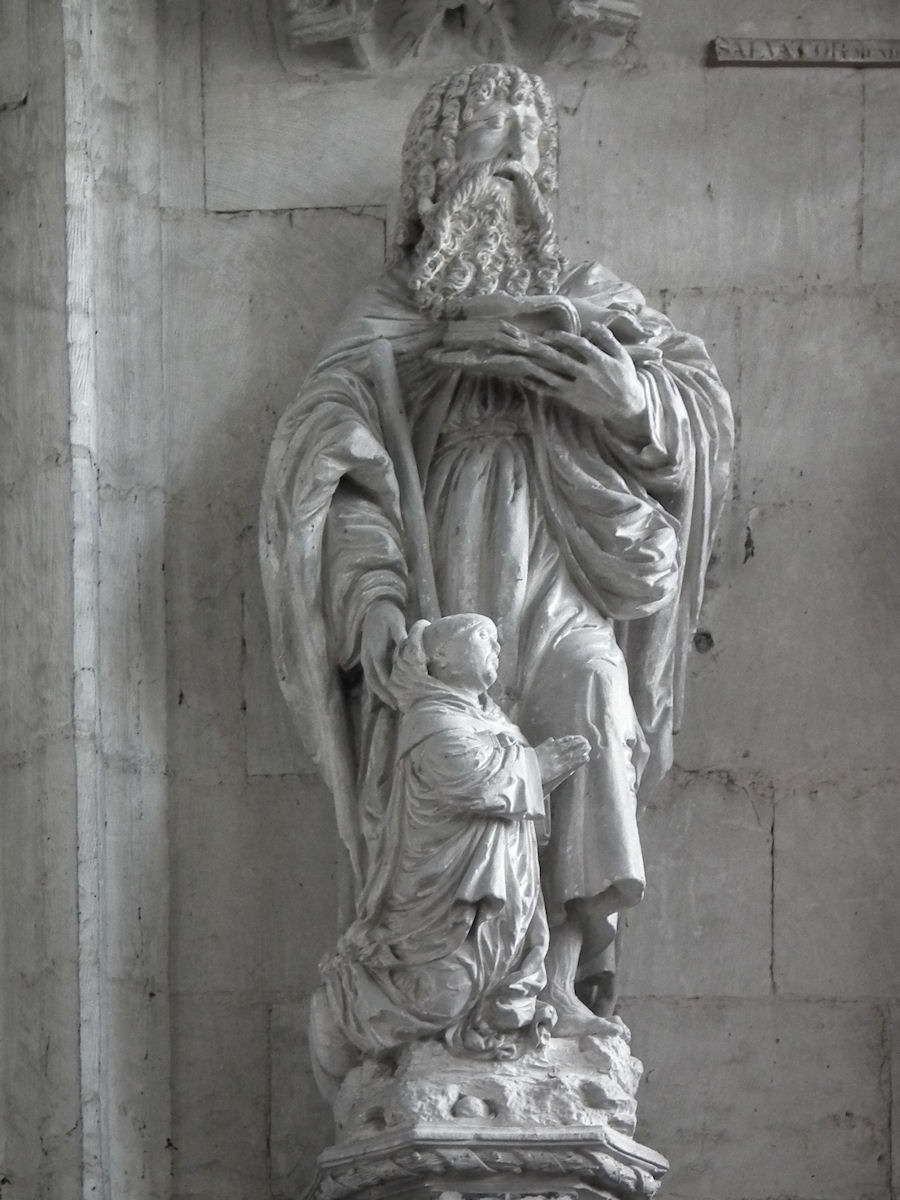 Abbaye de Saint-Riquier, Saint-Riquier, Somme, Picardie, France